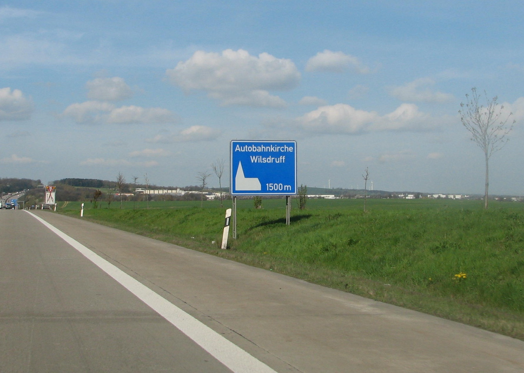 Blaues Hinweisschild auf die Autobahnkirche Wilsdruff kurz vor der Anschlussstelle Wilsdruff an der Bundesautobahn 4 Dresden Richtung Chemnitz.